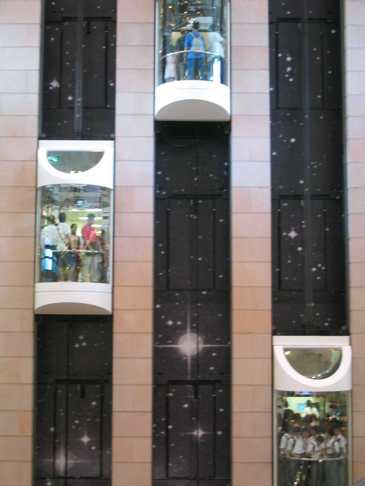 Hong Kong Central Library, Causeway Bay, Hong Kong